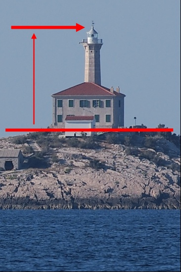 Feuerträgerhöhe = Höhe von Baugrund bis Dachfirst (Bekrönung)